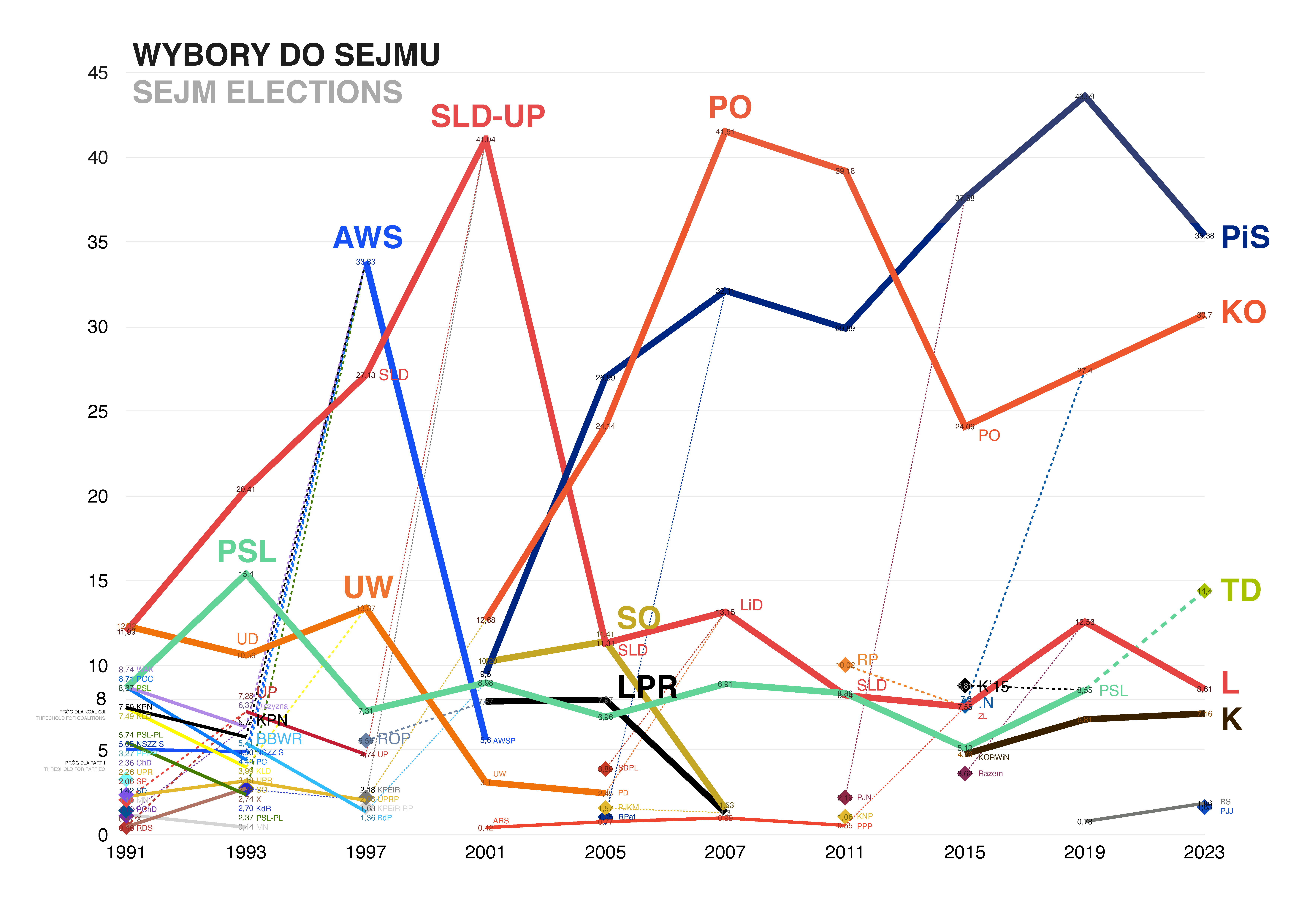 Procentowe wyniki wyborów do Sejmu, 1991-2019. Uwzględnione komitety z wynikiem powyżej 0,4%. ARS - Alternatywa Ruch Społeczny, AWS - Akcja Wyborcza Solidarność, AWSP - Akcja Wyborcza Solidarność Prawicy, BBWR - Bezpartyjny Blok Wspierania Reform, BdP - Blok dla Polski, BiS - Bezpartyjni i Samorządowcy, ChD - Chrześcijańska Demokracja, K'15 - Kukiz'15, KdR - Koalicja dla Rzeczypospolitej, KLD - Kongres Liberalno-Demokratyczny, KNP - Kongres Nowej Prawicy, KO - Koalicja Obywatelska, Konf - Konfederacja Wolność i Niepodległość, KORWiN - Koalicja Odnowy Rzeczypospolitej - Wolność i Nadzieja, KPEiR - Krajowa Partia Emerytów i Rencistów, KPEiR RP - Krajowe Porozumienie Emerytów i Rencistów RP, KPN - Konfederacja Polski Niepodległej, Lewica, LiD - Lewica i Demokraci, LPR - Liga Polskich Rodzin, MN - Mniejszość Niemiecka, .N - .Nowoczesna, NSZZ S - NSZZ Solidarność, Ojczyzna, PC - Porozumienie Centrum, PChD - Partia Chrześcijańskich Demokratów, PD - Partia Demokratyczna, PiS - Prawo i Sprawiedliwość, PJKM - Platforma Janusza Korwin-Mikke, PJN - Polska Jest Najważniejsza, PO - Platforma Obywatelska, POC - Porozumienie Obywatelskie Centrum, PPP - Polska Partia Pracy, PPPP - Polska Partia Przyjaciół Piwa, PSL - Polskie Stronnictwo Ludowe, PSL-PL - Polskie Stronnictwo Ludowe - Porozumienie Ludowe, Razem, RDS - Ruch Demokratyczno-Społeczny, ROP - Ruch Odbudowy Polski, RP - Ruch Palikota, RPat - Ruch Patriotyczny, SD - Stronnictwo Demokratyczne, SDPL - Socjaldemokracja Polska, SLD - Sojusz Lewicy Demokratycznej, SLD-UP - Sojusz Lewicy Demokratycznej - Unia Pracy, SO - Samoobrona, SP - Solidarność Pracy, UD - Unia Demokratyczna, UP - Unia Pracy, UPR - Unia Polityki Realnej, UPRP - Unia Prawicy Rzeczypospolitej, UW - Unia Wolności, WAK - Wyborcza Akcja Katolicka, X - Partia X, ZL - Zjednoczona Lewica